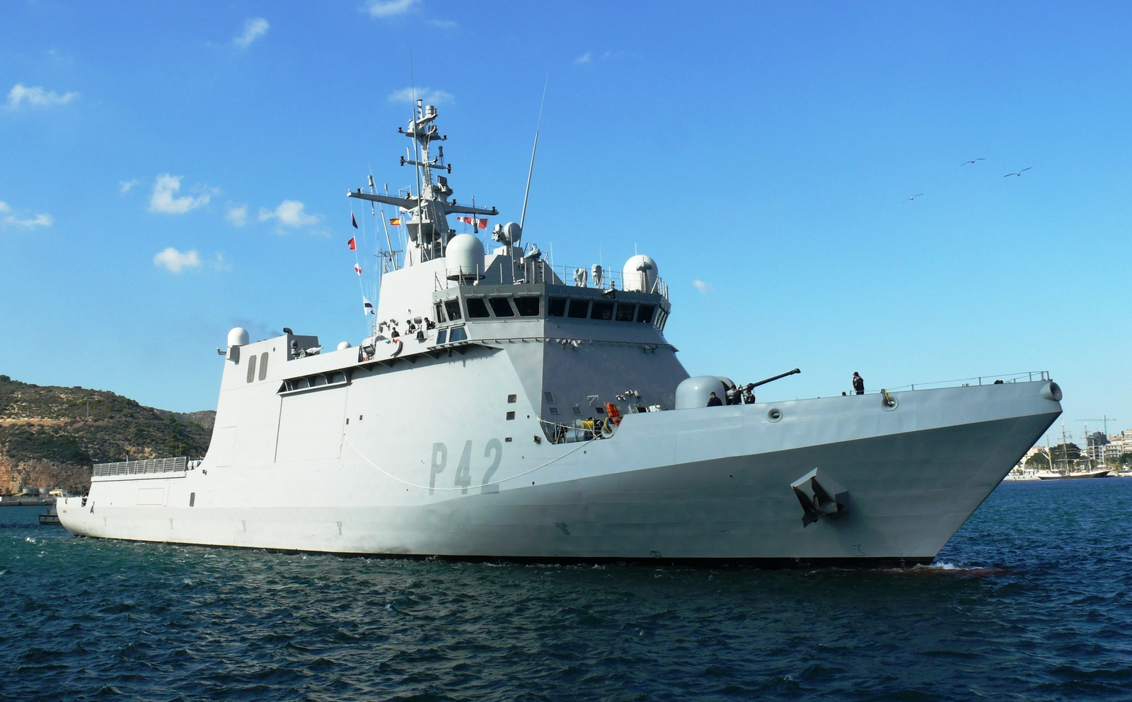 Buque de Acción Marítima (BAM) Rayo (P-42), de la Armada Española en Cartagena